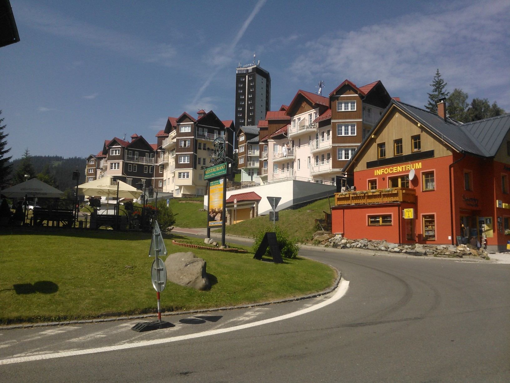 Pec pod Sněžkou, Czechy, sierpień 2013